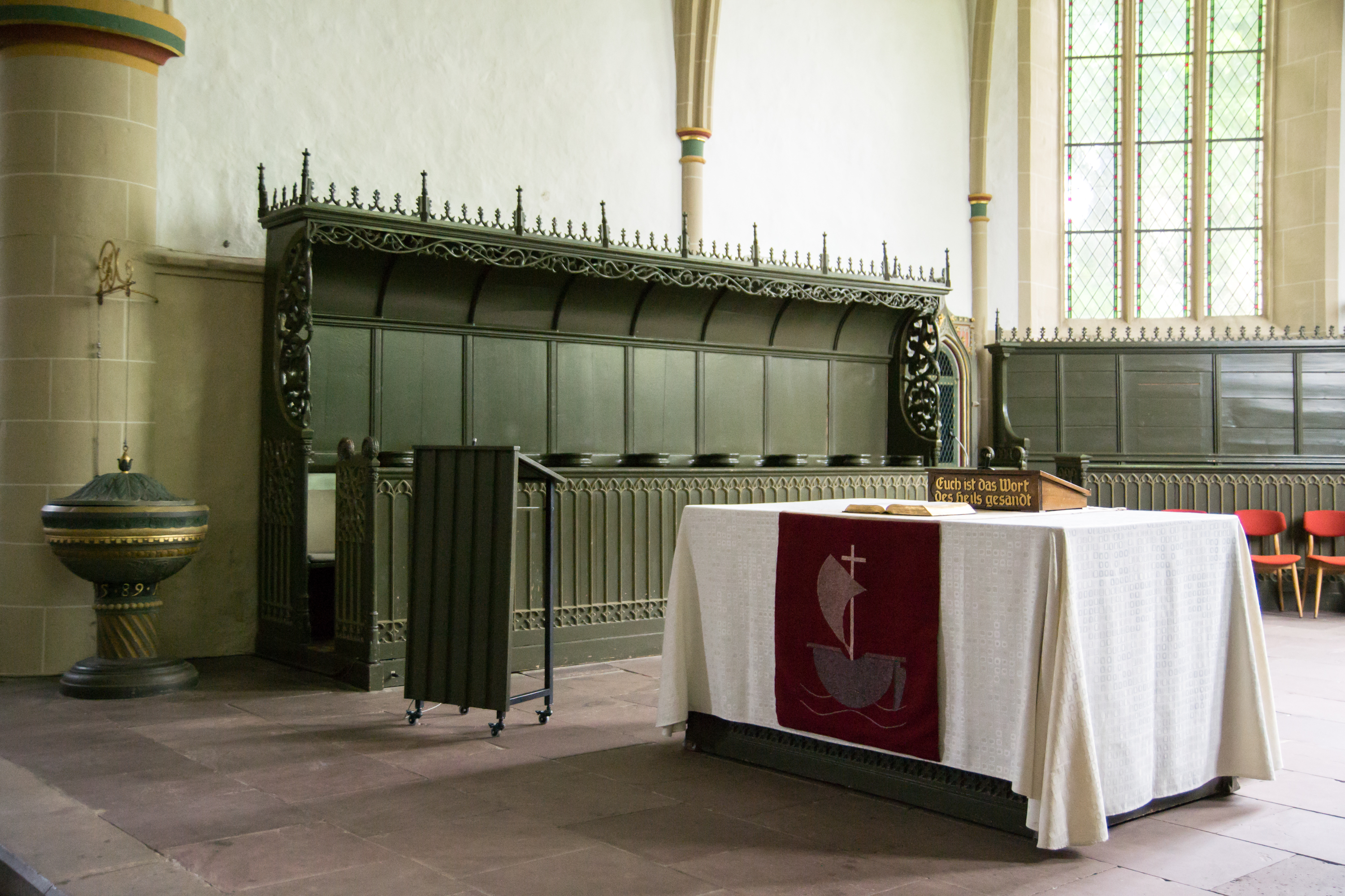 Evangelische Kirche Horn